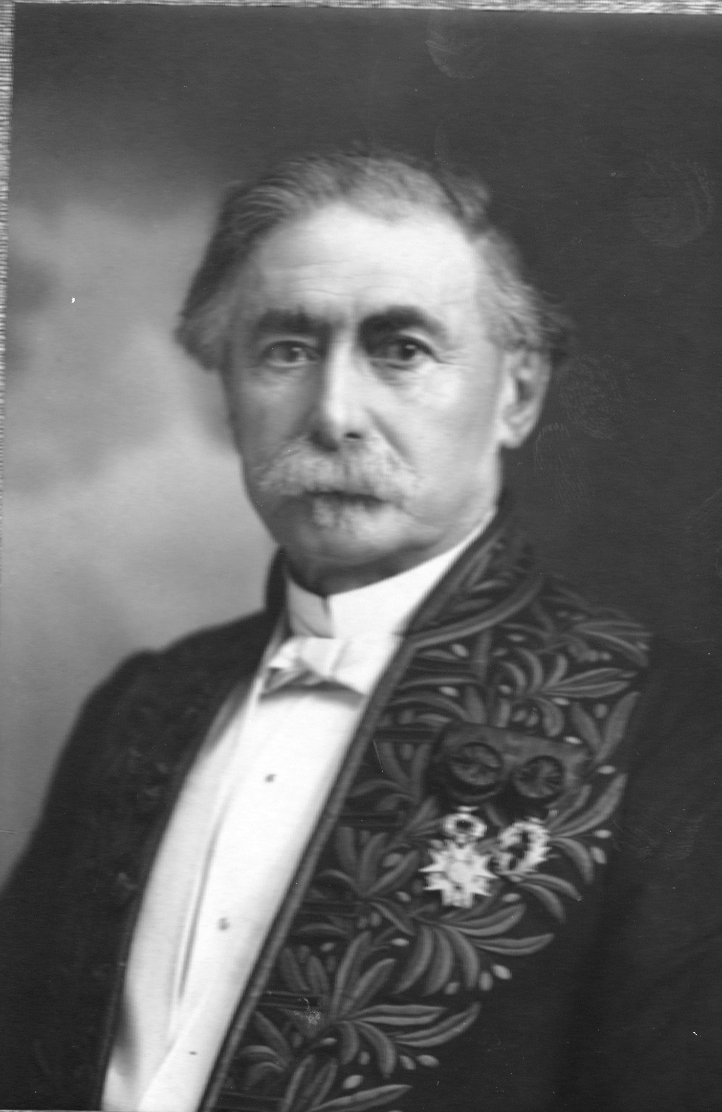 Emile-Hilaire Amagat, physicien en uniforme d’académicien